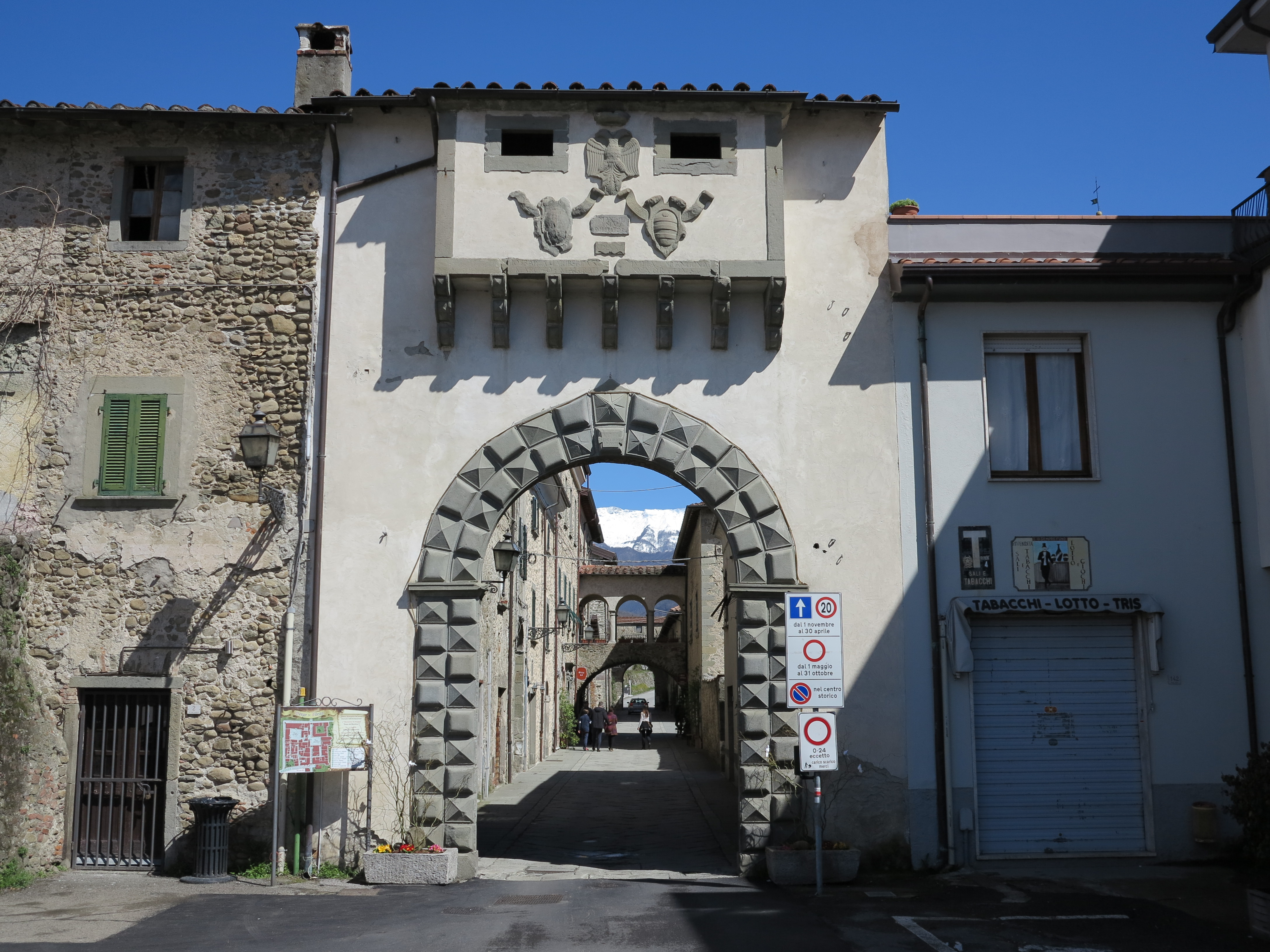 Porta di Filetto (Villafranca in Lunigiana)_Viale Italia